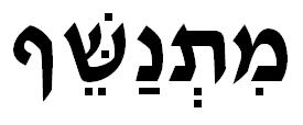 Hebrew Niqqud